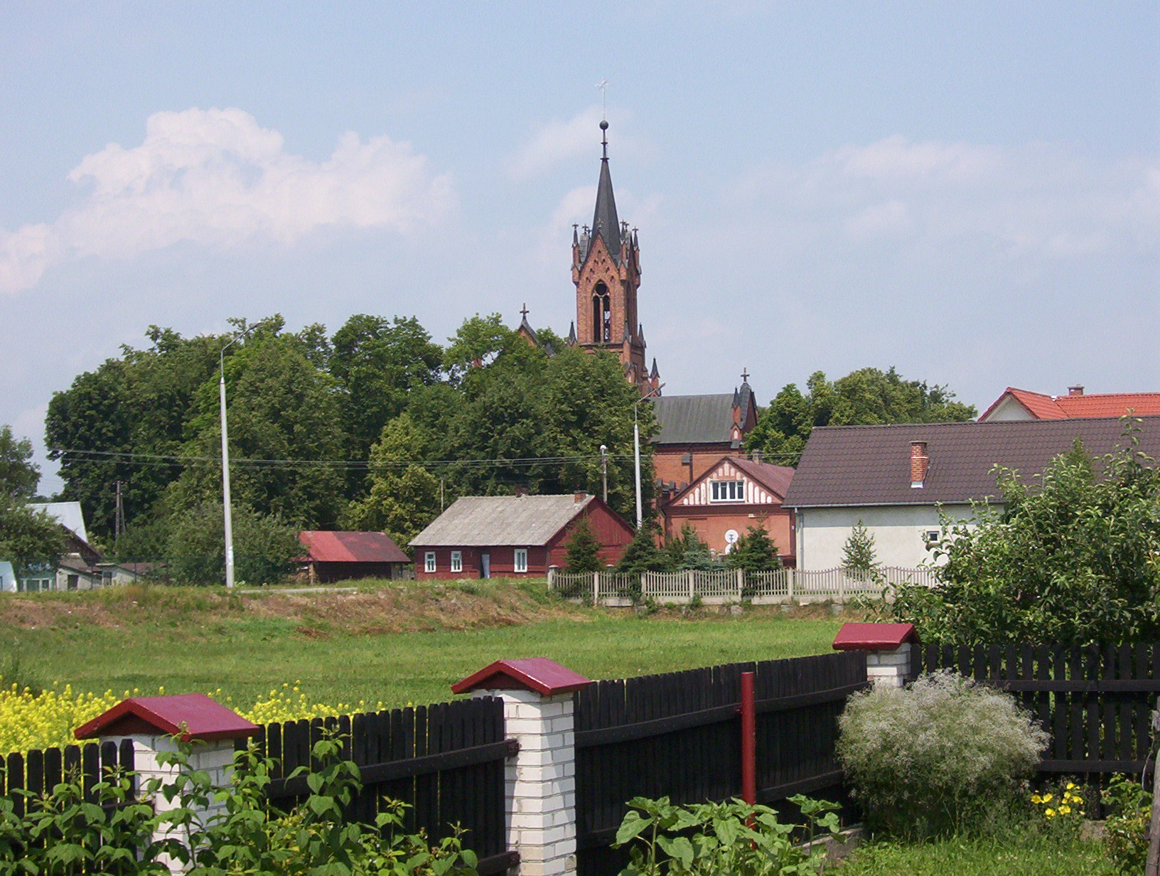 Panorama Komarówki Podlaskiej, Kościół par. p.w. Najświętszego Serca Jezusowego w Komarówce Podlaskiej (zabytek nr rejestr. A/225)